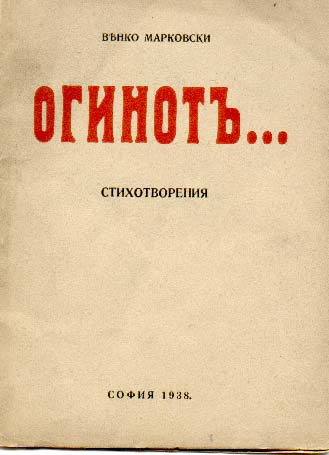 Корица на книгата на Венко Марковски „Огинот“.